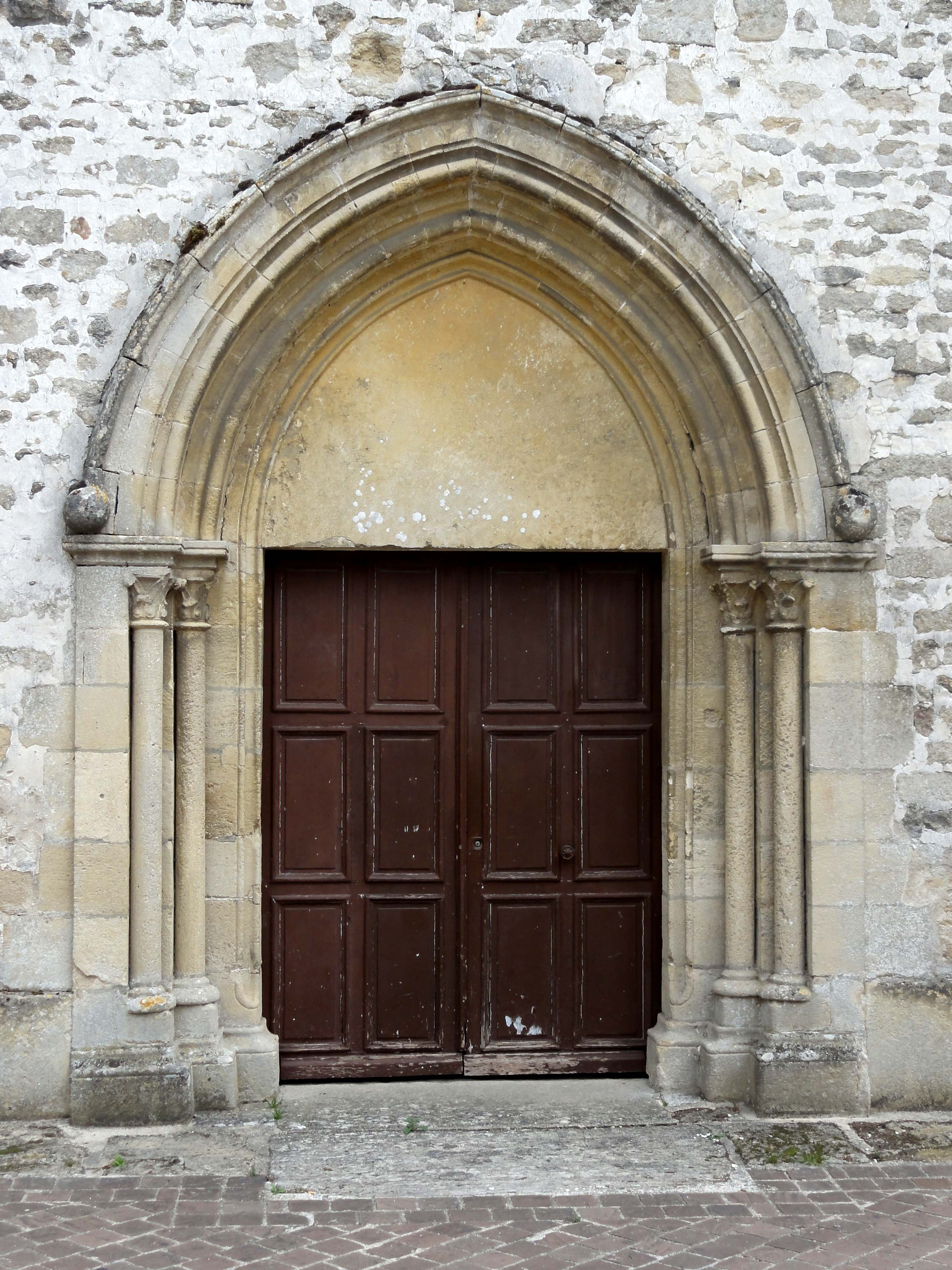 Église Saint-Sulpice de Seraincourt - voir titre.